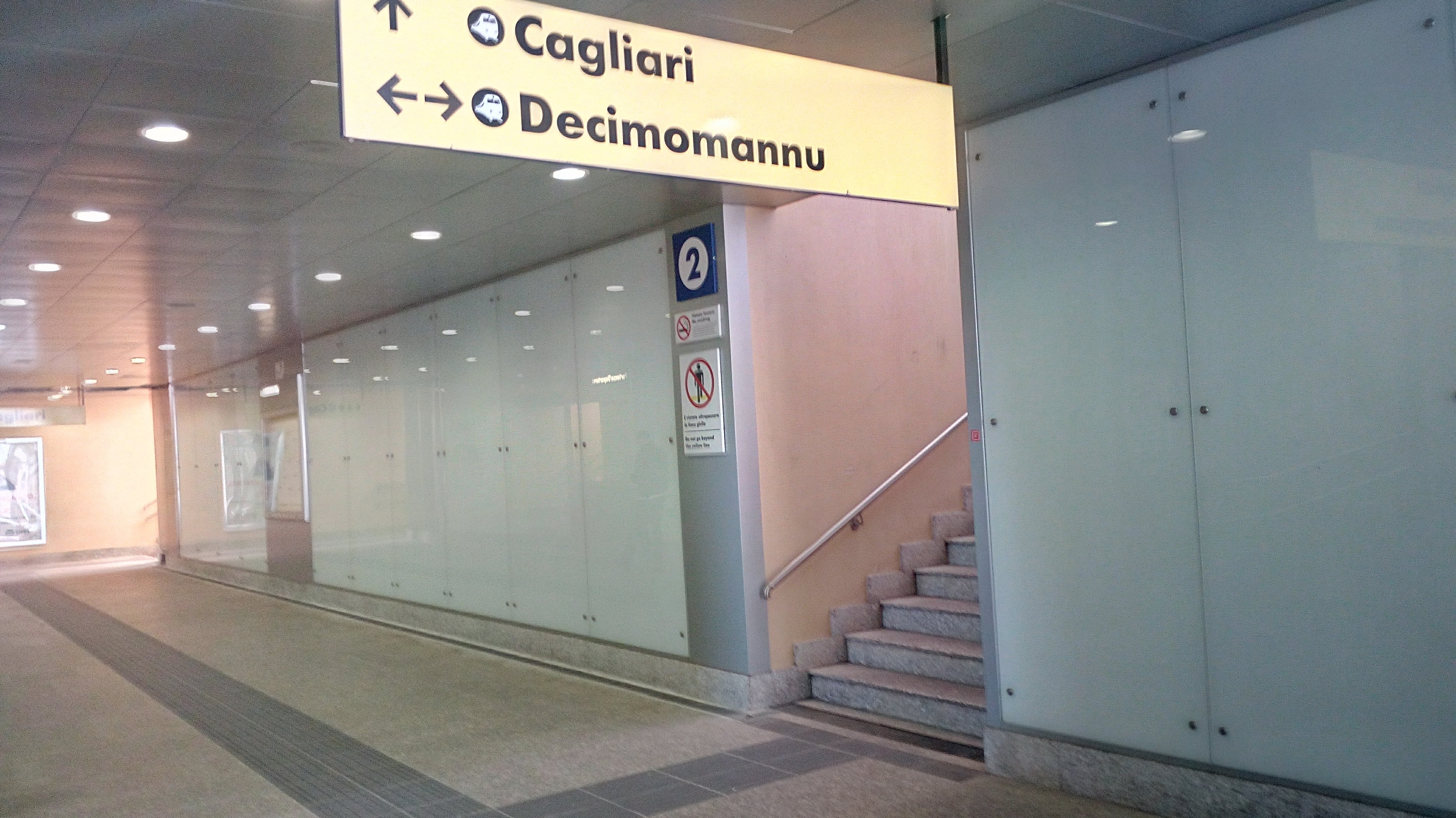 L'ingresso ai binari sotterraneo della stazione ferroviaria di Elmas Aeroporto.